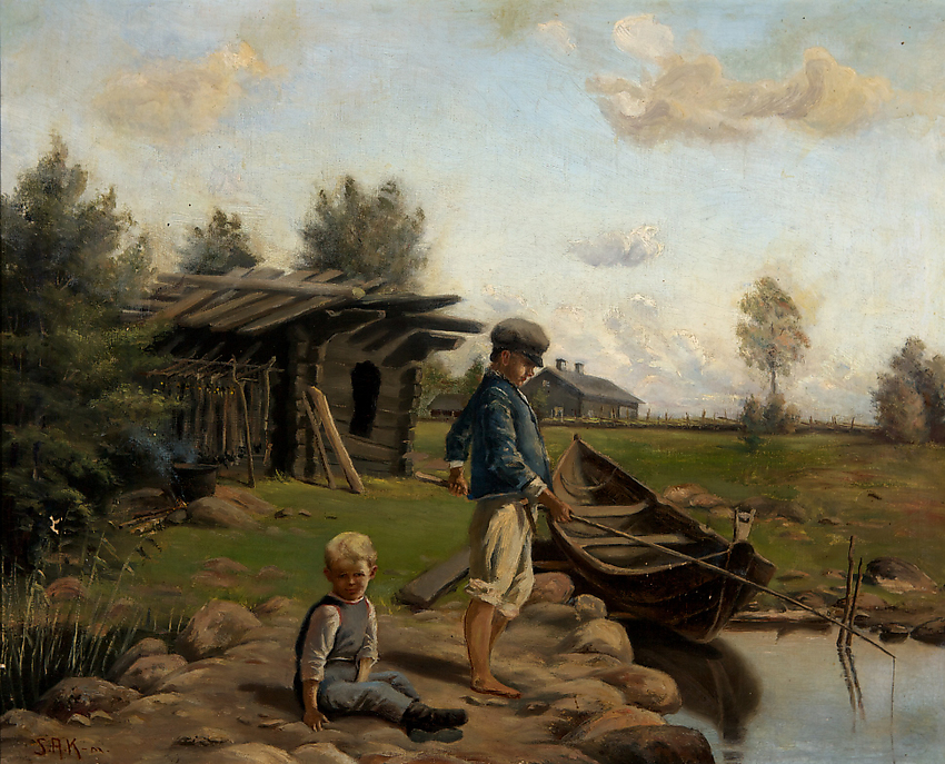 Keinänen, Sigfrid August (1841-1914) Onkipoika, öljy kankaalle, sign., 50 x 61